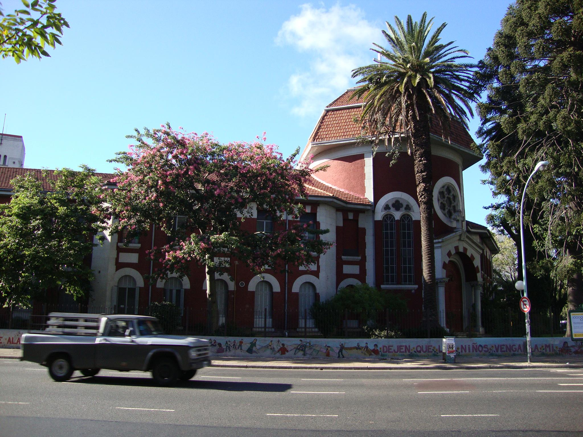 Edificio pintoresco del Instituto Divino Rostro, en uno de los bordes del Parque Centenario. Avenida Ángel Gallardo y Leopolo Marechal. Buenos Aires, Argentina.